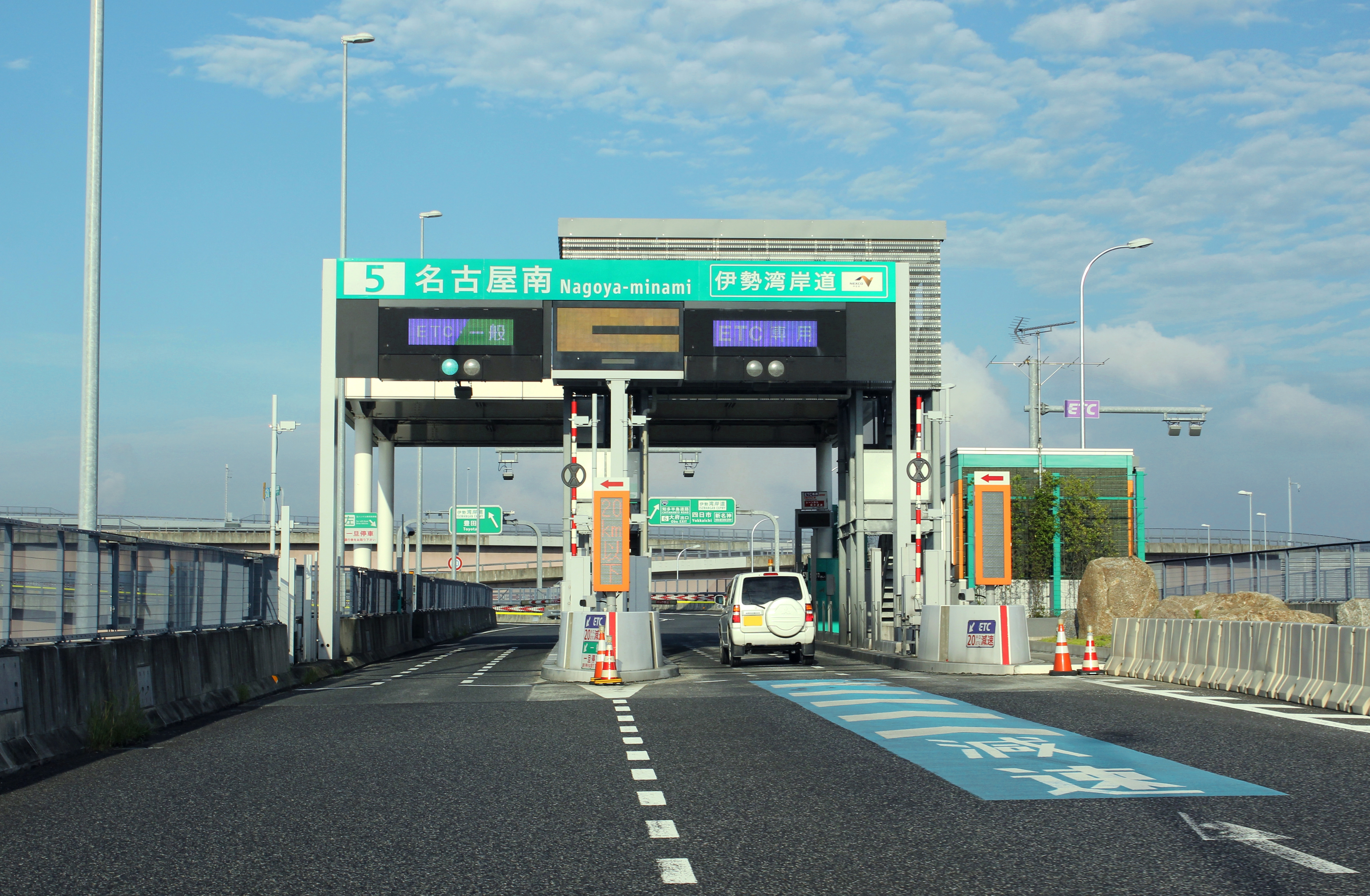 名古屋南JCT料金所（名二環→伊勢湾岸）